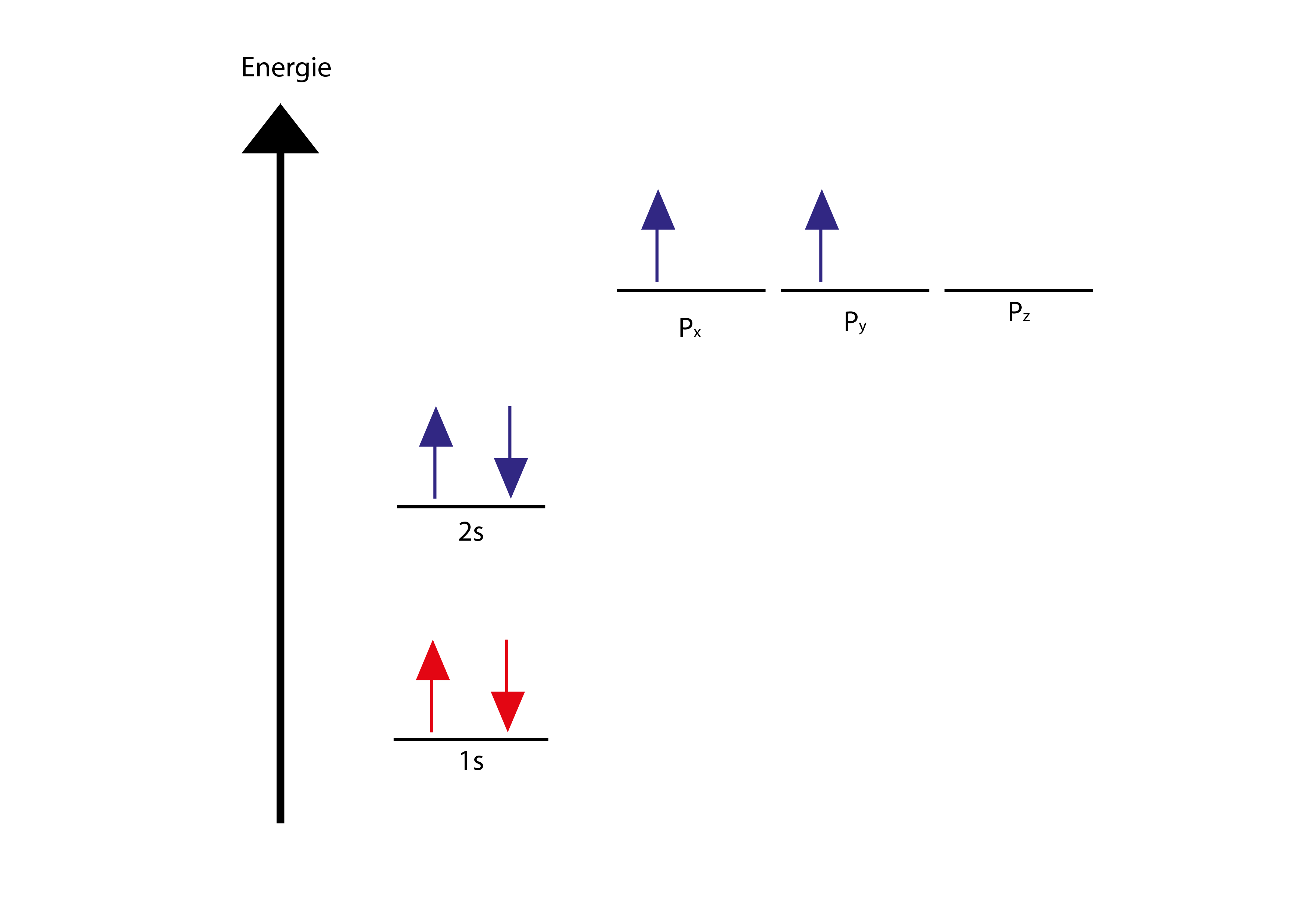 Elektronenkonfiguration des Kohlenstoff Atoms